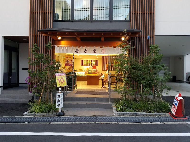 金吾堂外観写真